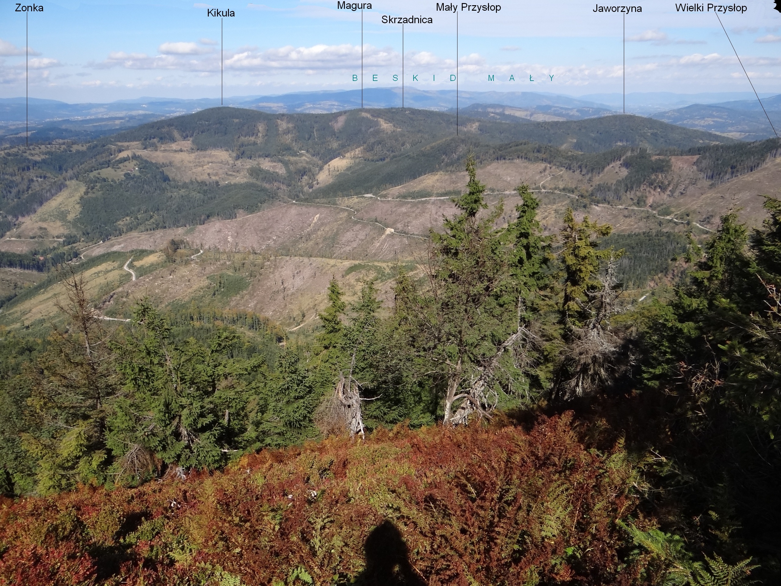 Widok z wielkiej Raczy